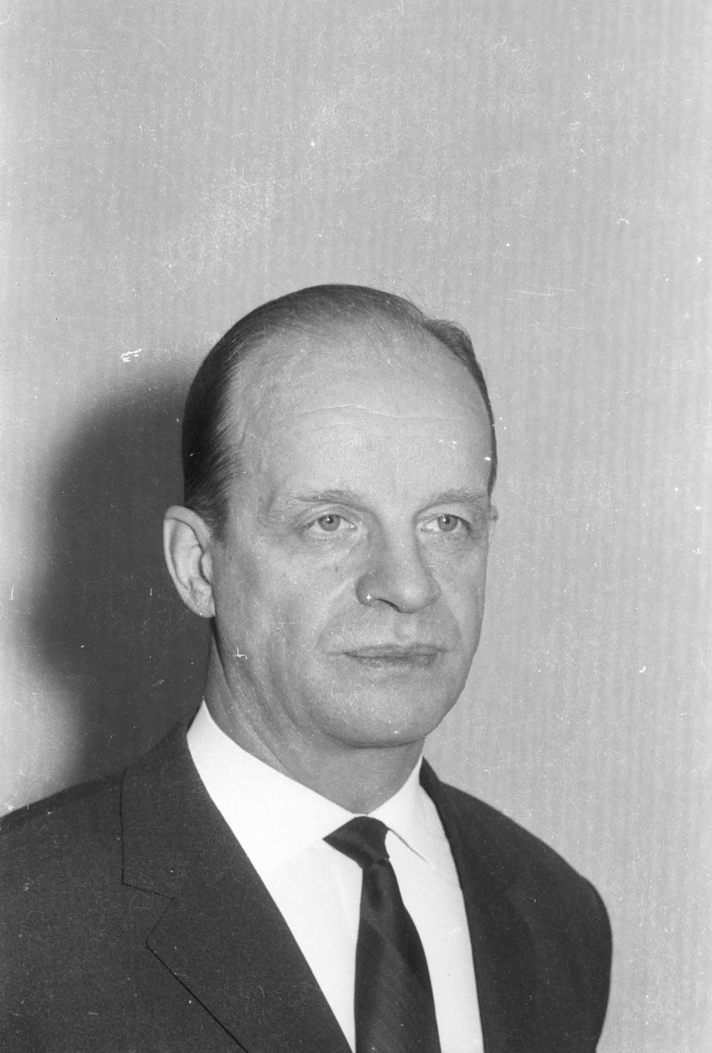 Professor für Theologie (Altes Testament) an der Christian-Albrechts-Universität (CAU).